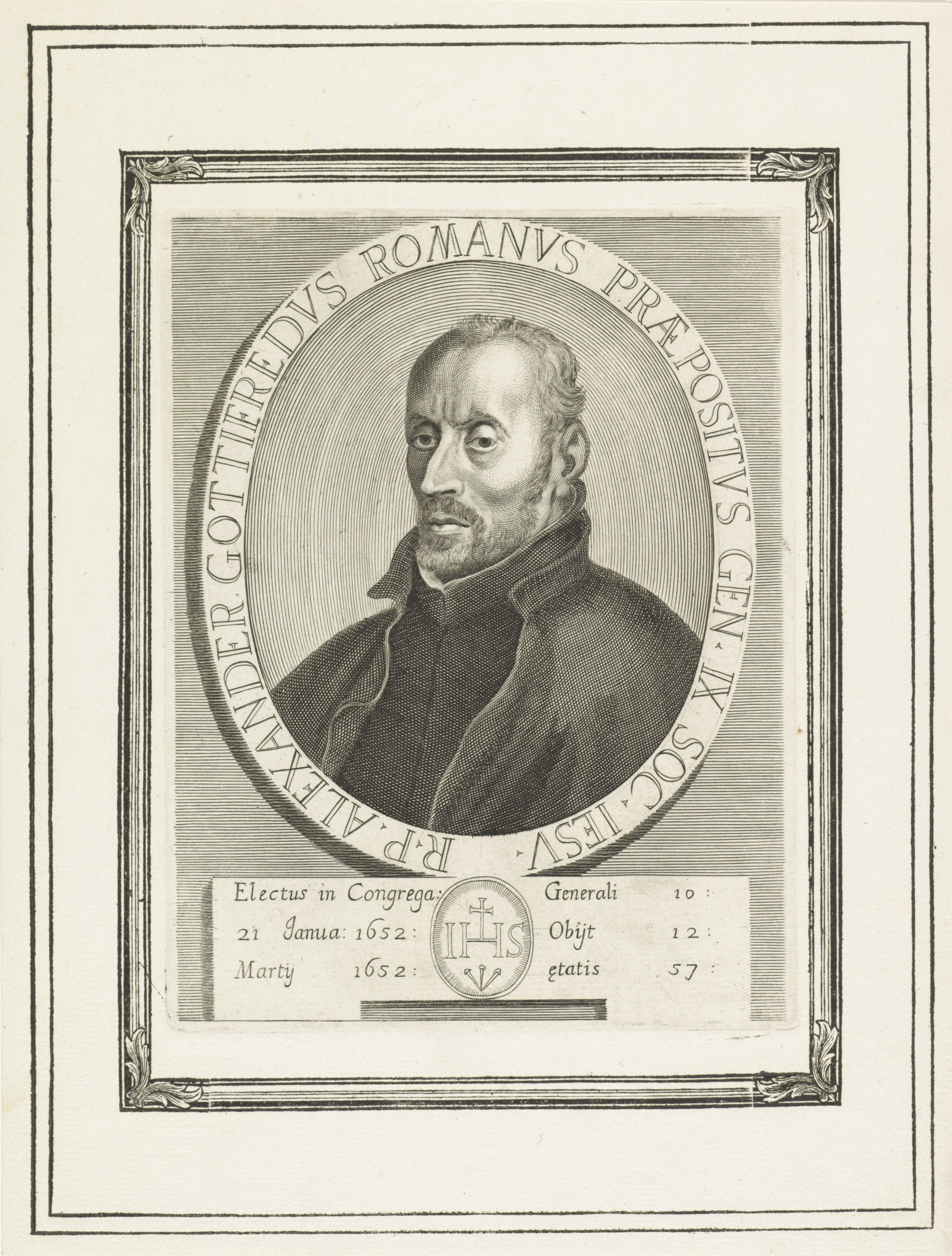 IdentificatieTitel(s): Portret van de Italiaanse priester Alessandro GottifrediObjecttype: prent boekillustratie Objectnummer: RP-P-OB-76.867Catalogusreferentie: Bodart 203Opschriften / Merken: titel, in rand om portret, gegraveerd: ‘R.P. ALEXANDER GOTTIFREDUS ROMANUS PRAEPOSITUS GENERALIS IX. SOC. IESU’verzamelaarsmerk, verso, gestempeld: Lugt 2228Omschrijving: In het kader onder zijn portret het monogram van de jezuïeten.VervaardigingVervaardiger: prentmaker: Arnold van WesterhoutPlaats vervaardiging: ItaliëDatering: 1751Fysieke kenmerken: gravure en houtsnede, gedrukt van twee platenMateriaal: papier Techniek: graveren (drukprocedé) / houtsnedeAfmetingen: plaatrand: h 200 mm × b 152 mmblad: h 305 mm × b 230 mmToelichtingPrent gebruikt in: Galeotti, Niccolò. Imagines praepositorum generalium Societatis Jesu, delineatae, et aereis formis expressae ab Arnoldo Van Westherhout, addita perbrevi uniuscujusque vitae descriptione. Rome: Monaldini, 1751.OnderwerpWat: IHS ('Iesus Hominum Salvator') ~ symbol of ChristWie: Alessandro GottifrediVerwerving en rechtenVerwerving: onbekendCopyright: Publiek domein